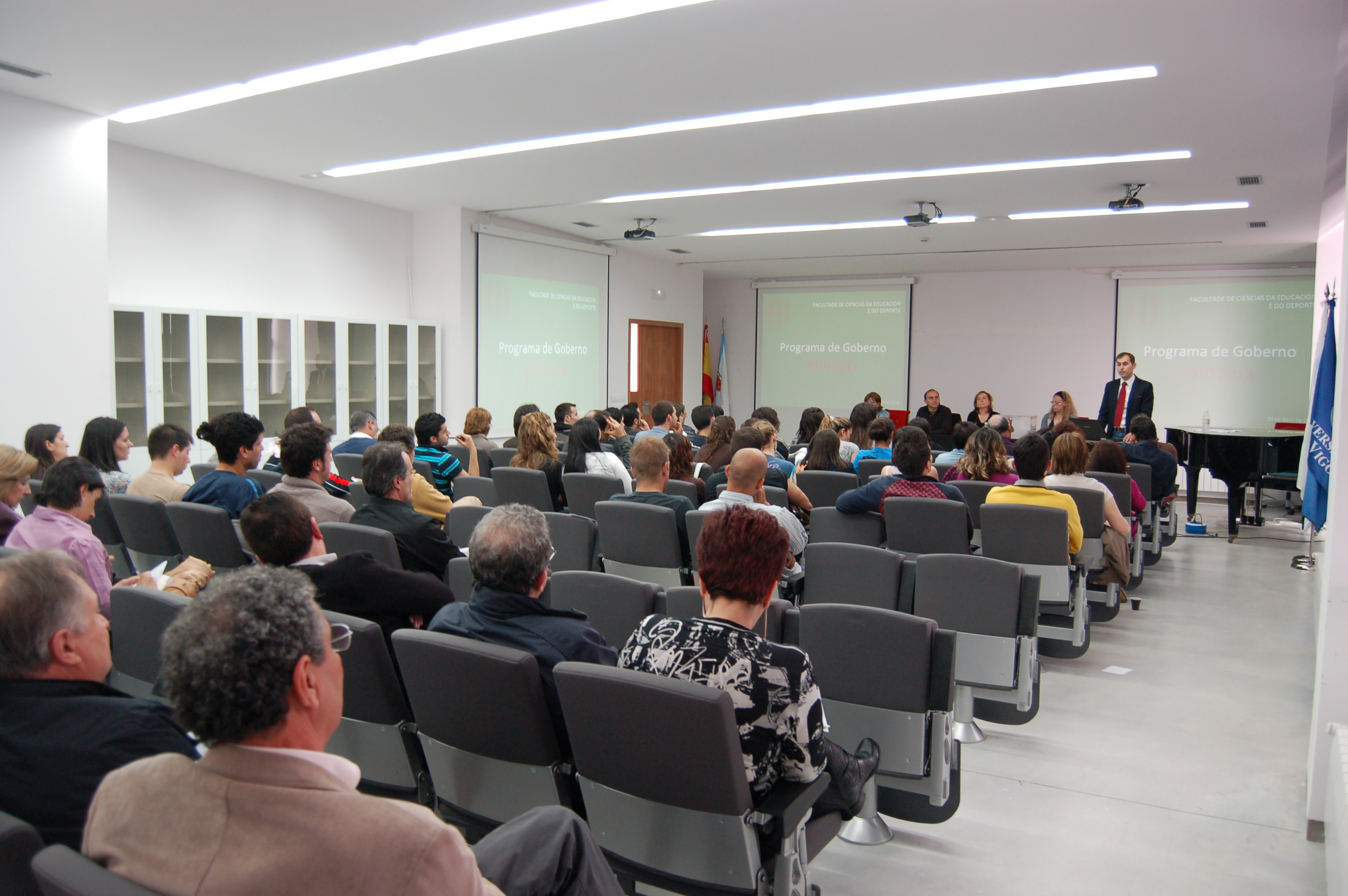 Salón de Graos da Facultade de Ciencias da Educación e do Deporte de Pontevedra, durante a elección ao decanato.